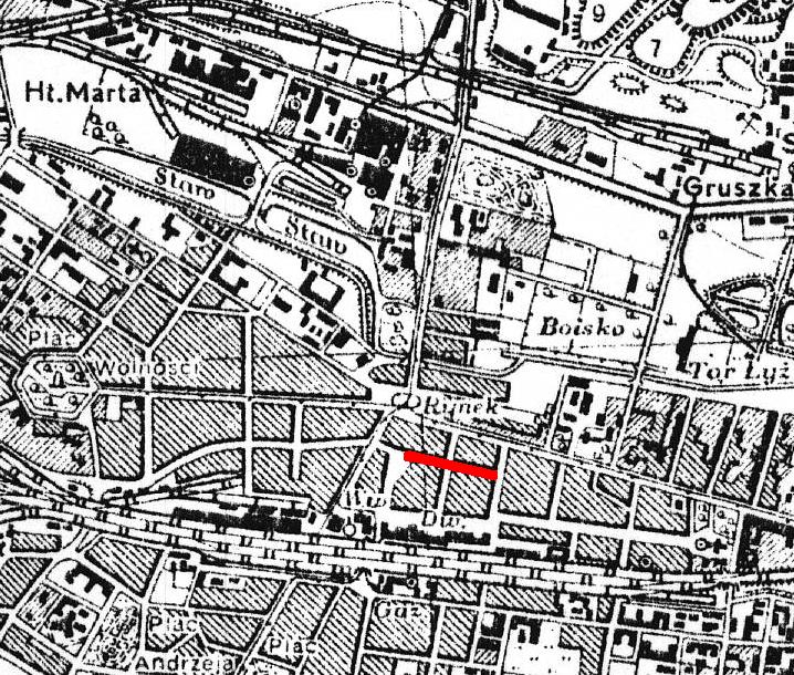 Mapa ulicy Staromiejskiej w Katowicach (zaznaczona czerwoną linią) na fragmencie mapy Wojskowego Instytutu Geograficznego w Warszawie z roku 1933 (PAS 47 - SŁUP 28 - H)